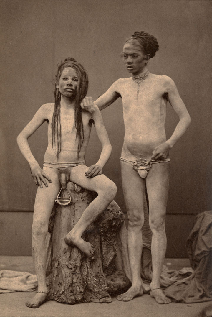 "Fakirs", 1870-80. Carte de Visite